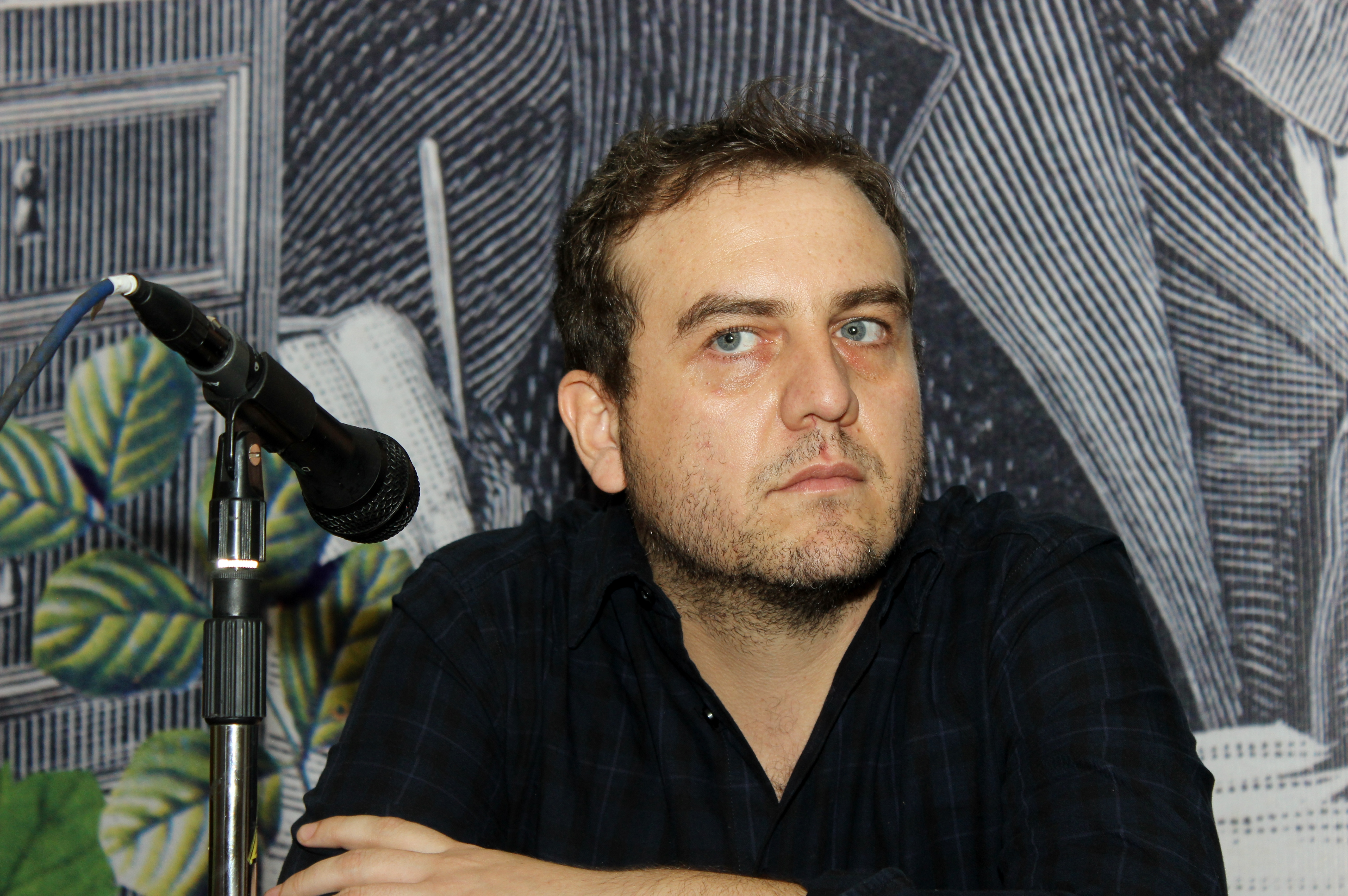 El periodista, guionista de televisión y escritor chileno Pablo Toro en la Feria Internacional del Libro de Santiago 2018.